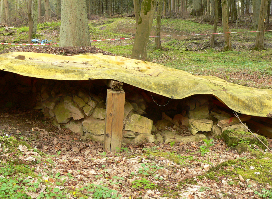 Ausgrabungsstelle Waldglashütte unter dem Hilsborn